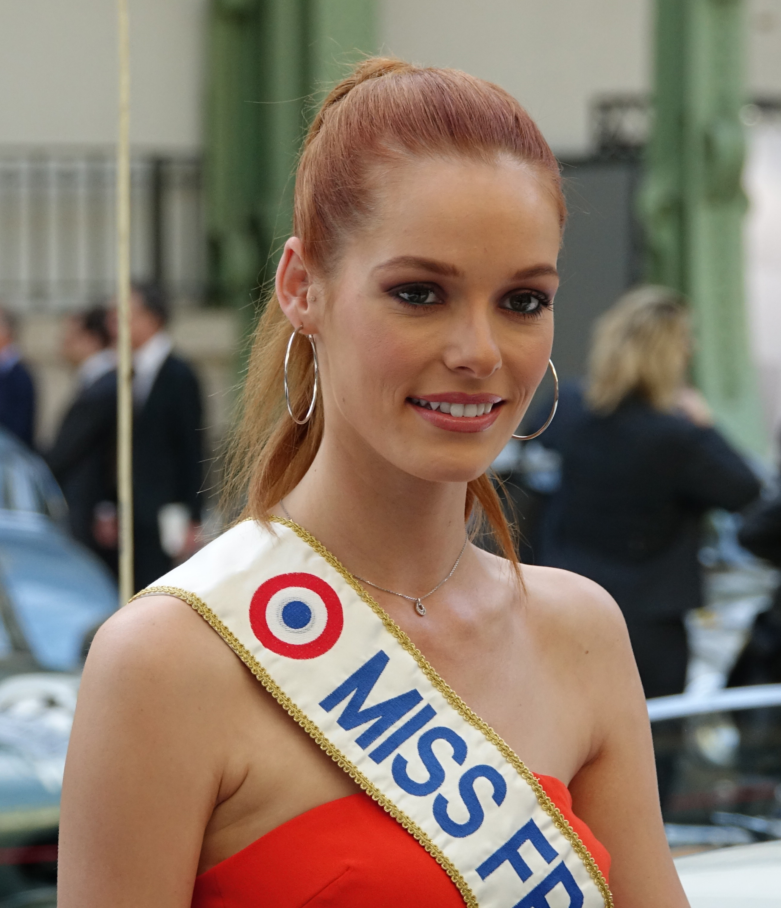 Maëva Coucke au Tour Auto Optic 2000